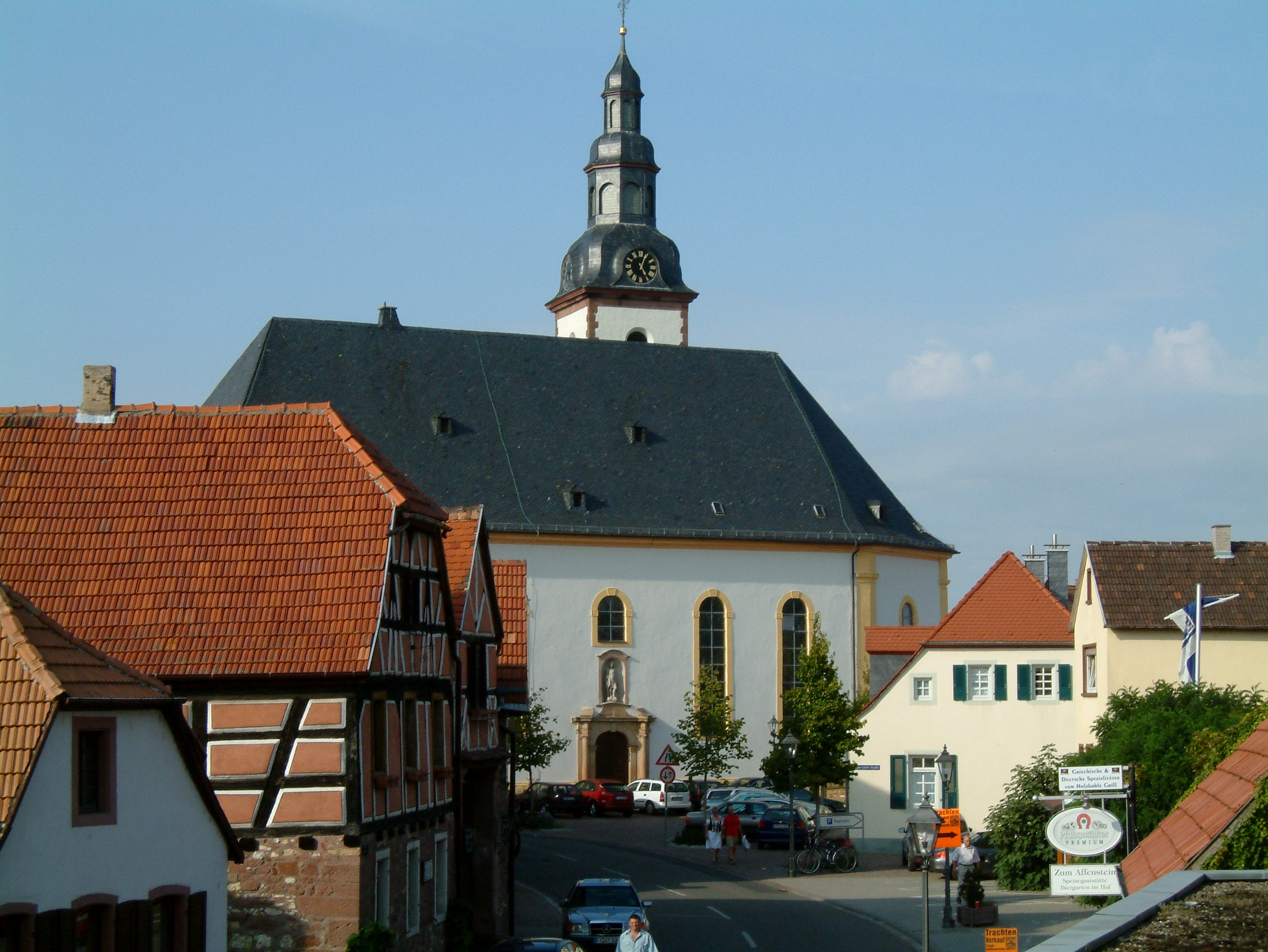 Laurentiuskirche (Südansicht) zu Dirmstein, selbst fotografiert am 10.09.2006 und freigegeben durch Benutzer:Mundartpoet